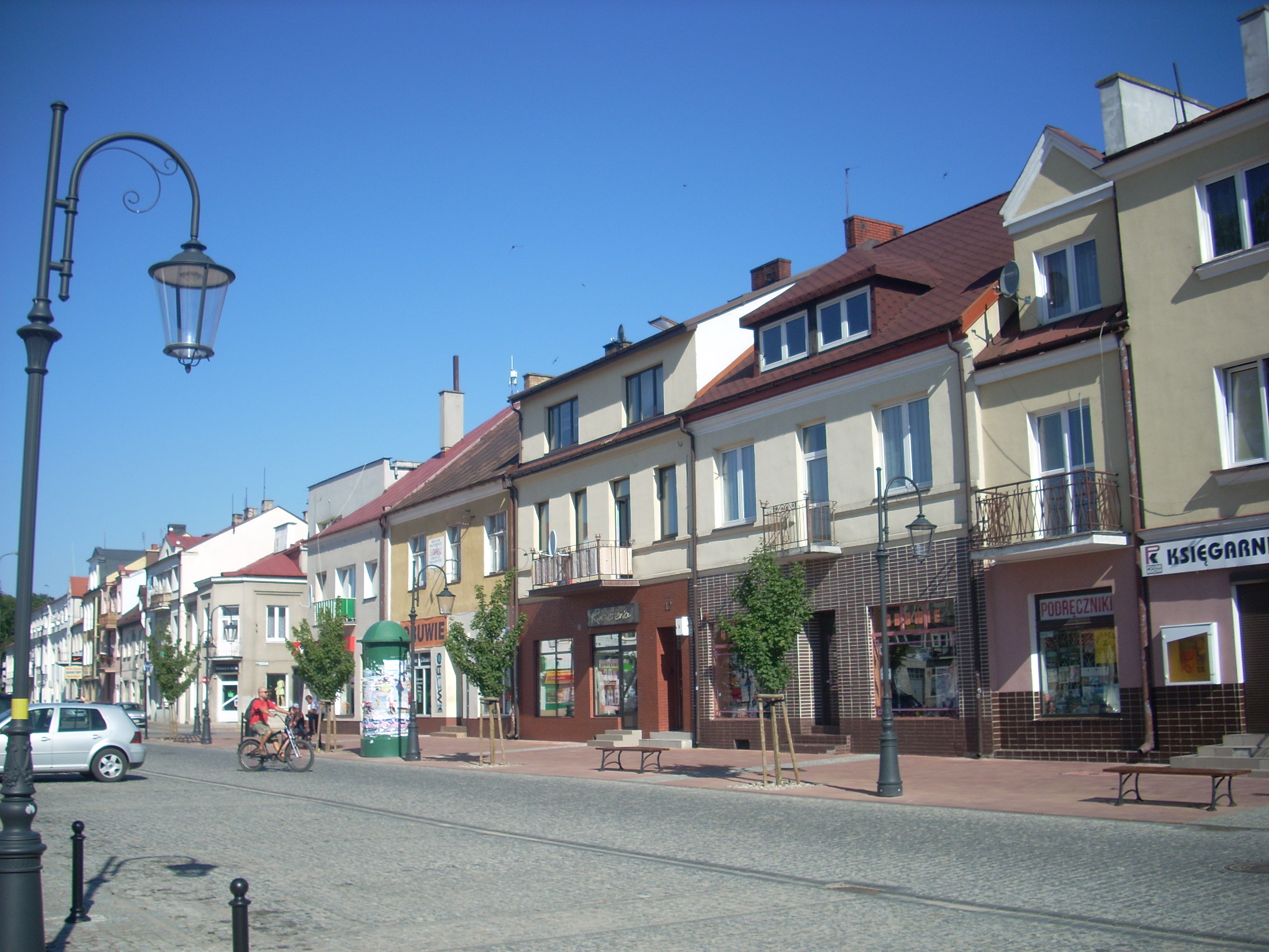 Północna pierzeja rynku w Przasnyszu